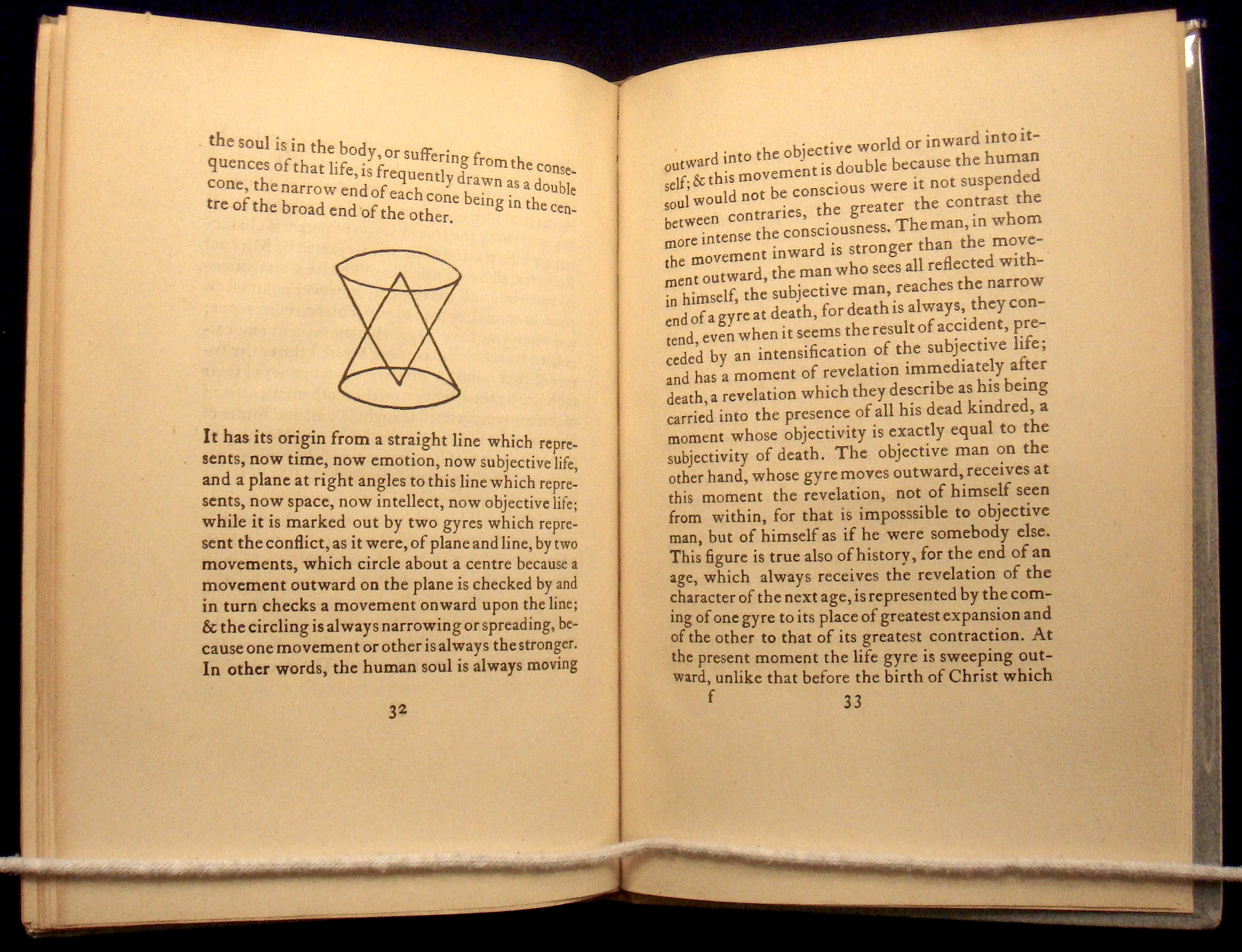 הערות לפואמה "הביאה השנייה" הוצאת קואלה ,שנת 1921 , אירלנד